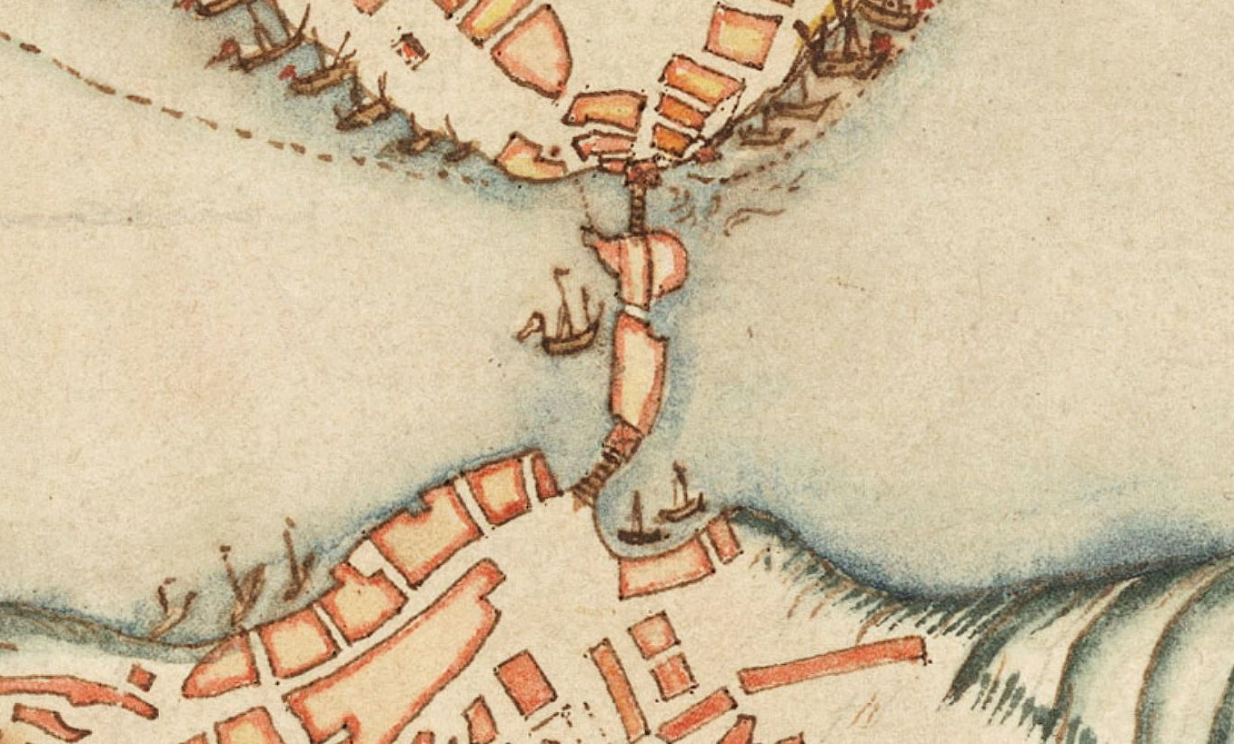 Del av Karta över hela Stockholm visande Slussenområdet